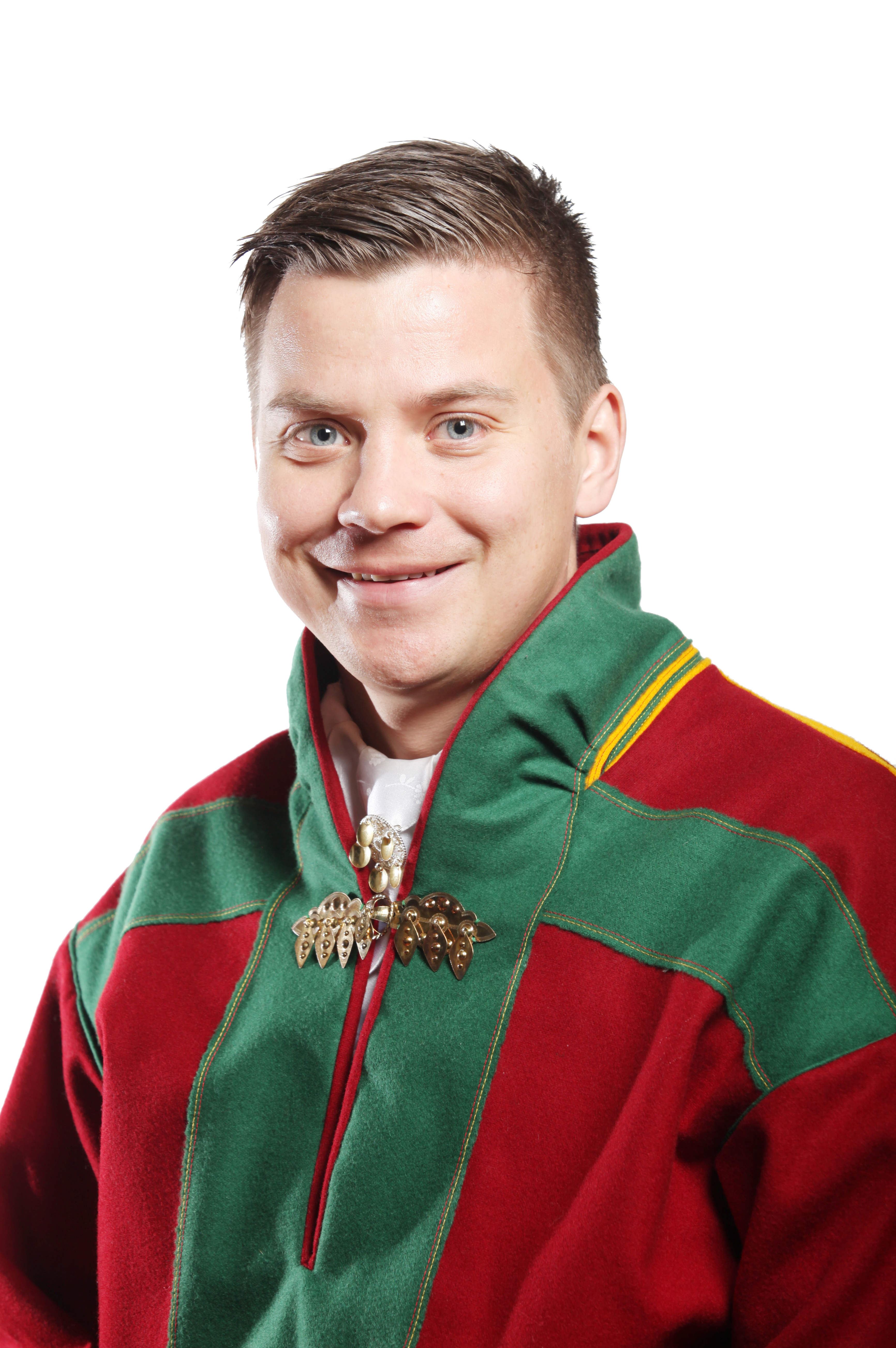 Medlem av oppvekst.-, omsorg- og utdanningskomitéen. Foto: Kenneth Hætta / Sametinget.